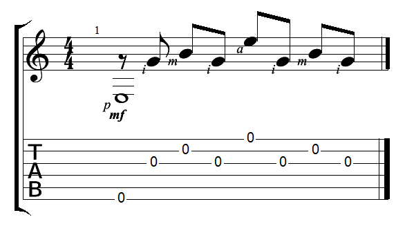 Перебор на гитаре